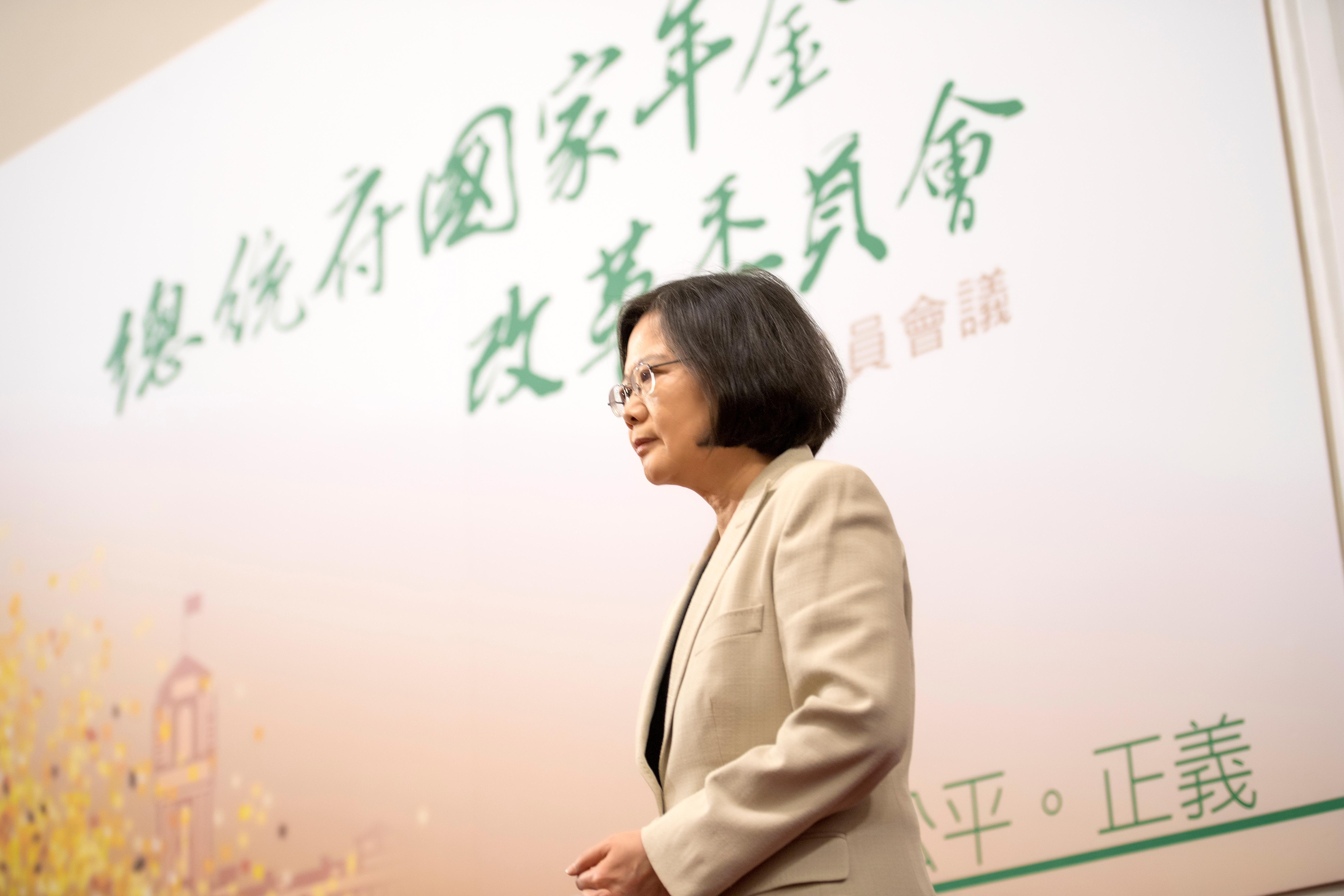 中華民國總統蔡英文出席「總統府國家年金改革委員會」第一次委員會議，強調年金制度的改革「現在不做，馬上就會後悔」，並期盼改革之後的年金制度能成為社會安全網的重要一環，穩定人心、團結社會。